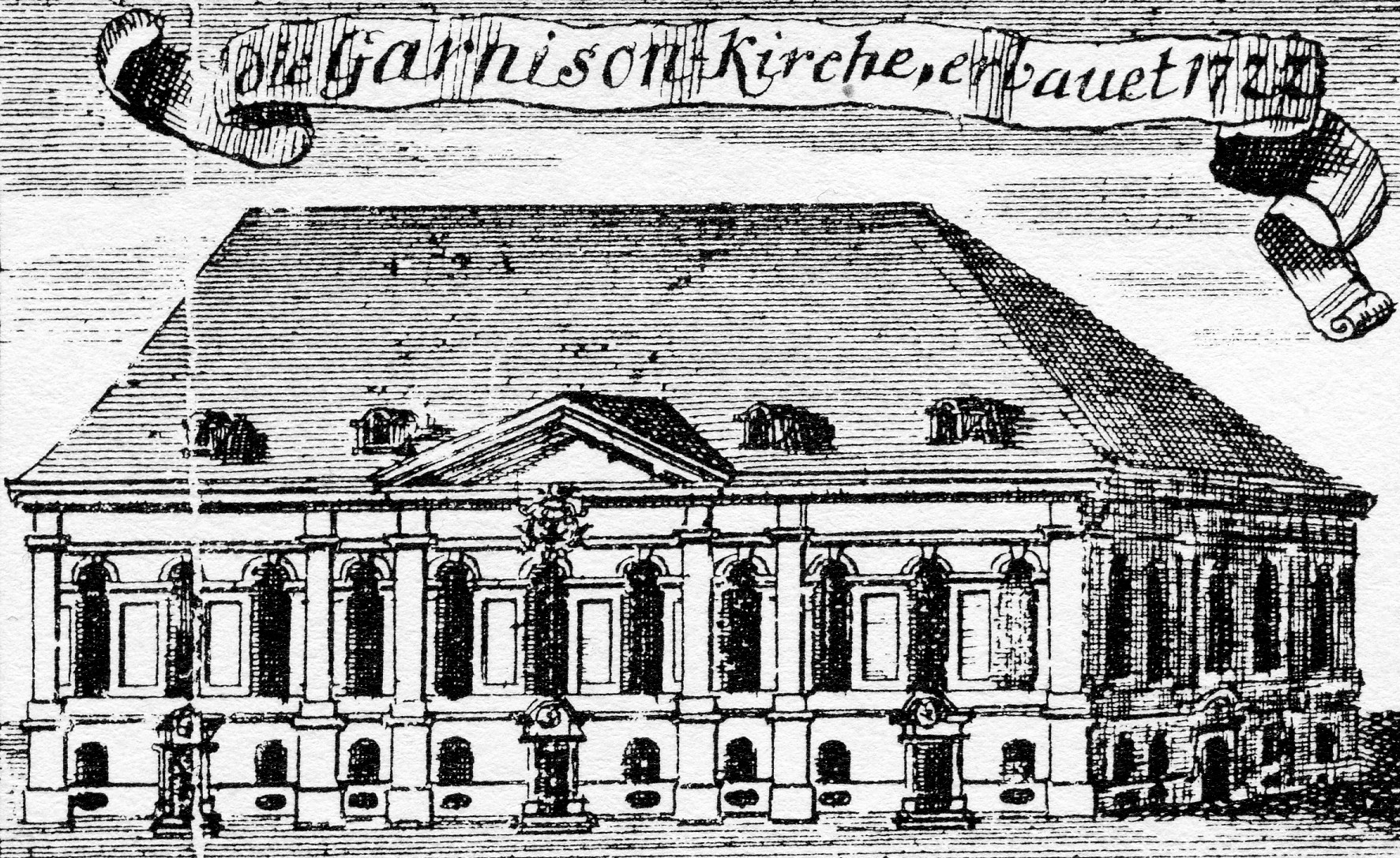 Garnisonkirche in Berlin-Mitte